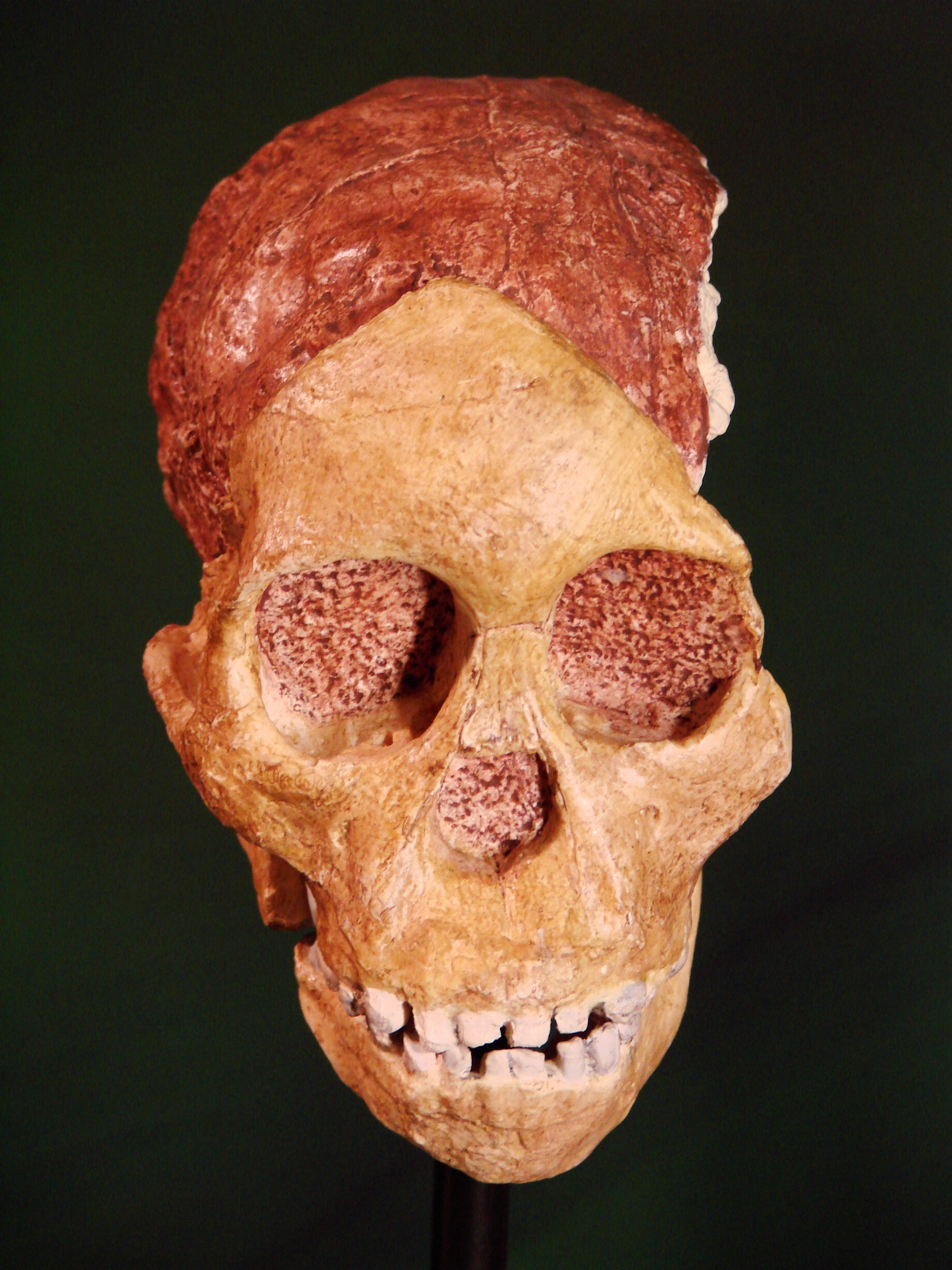 Muséum d'Anthropologie, campus universitaire d'Irchel, Université de Zurich (Suisse) : Australopithecus africanus , enfant de Taung (Taung, Afrique du sud)